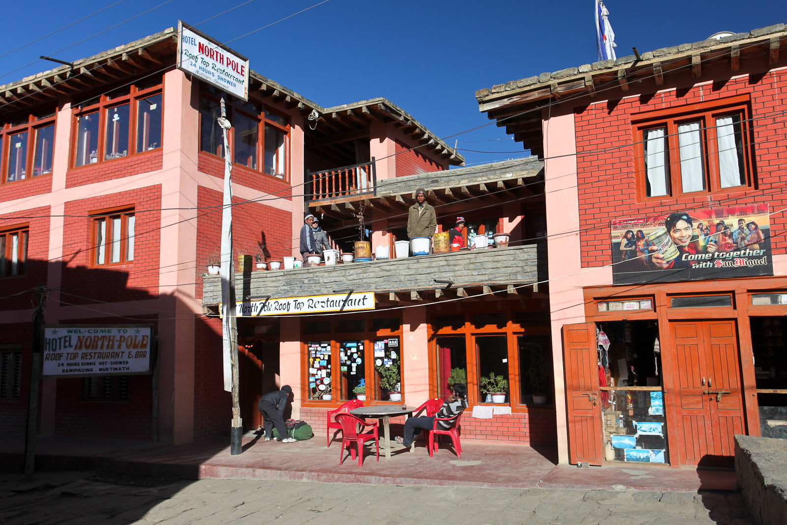 exterior